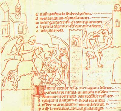 Vjezd Raymonda VI. do Toulouse, vraždění křižáků